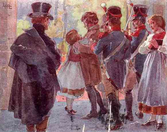 Cartolina invito alla rappresentazione dell'opera "Germania" di Alberto Franchetti - illustrazione del prologo - timbri postali: spedita da Torino il 27.10.1903 arrivata a Palermo il 29.10.1903